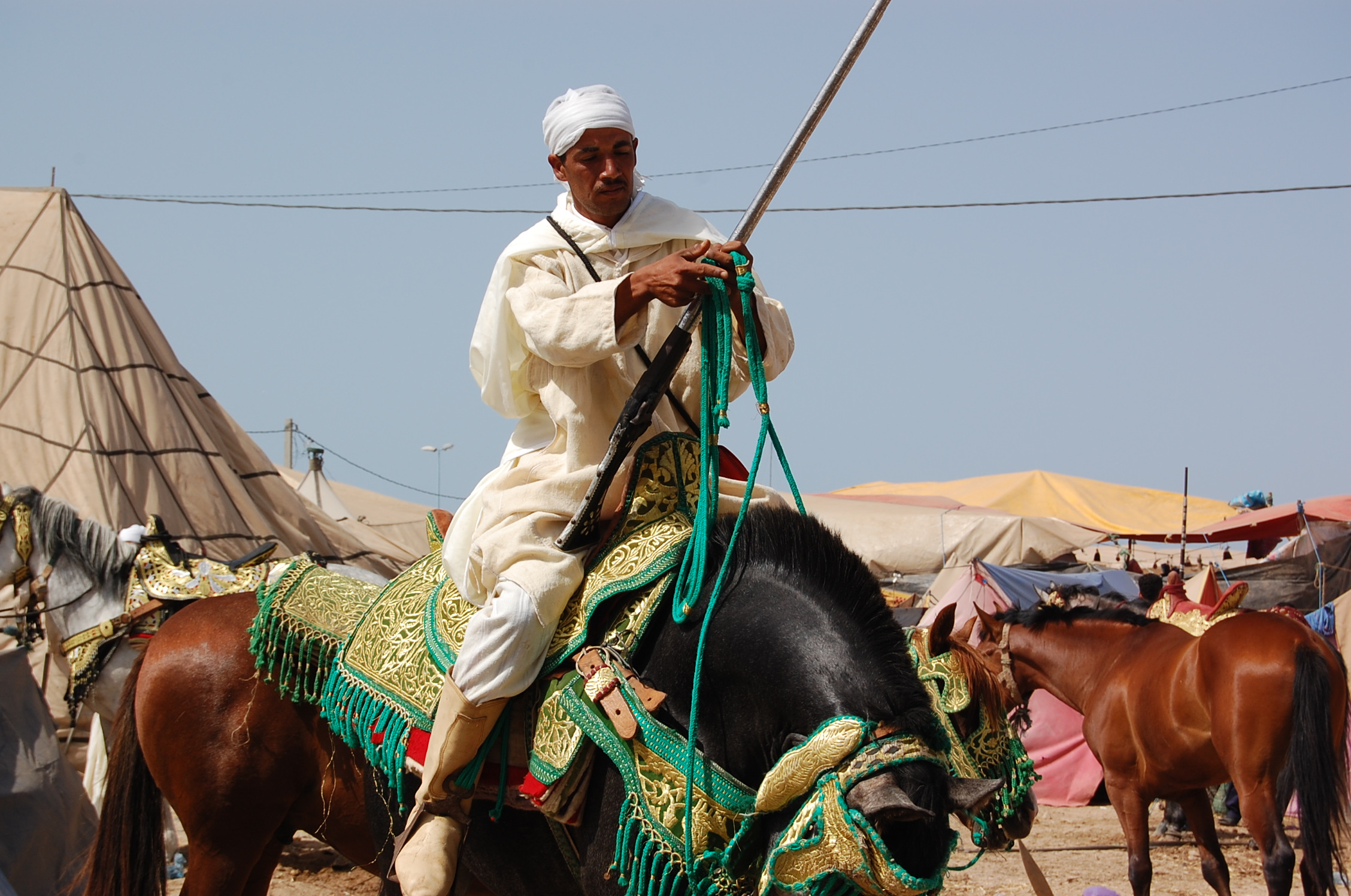 Walon: Fantazia Moulay Abdellah : cavlî avou s' shoflete